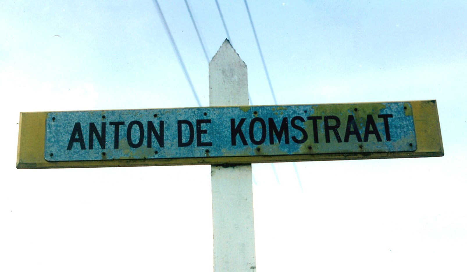 De Anton de Komstraat in Paramaribo. Eigen opname.